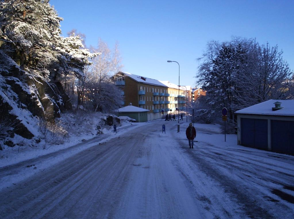 Östra Midvintersgatan i stadsdelen Kortedala i Göteborg, den 20 december 2004. En bild tagen av Harri Blomberg.